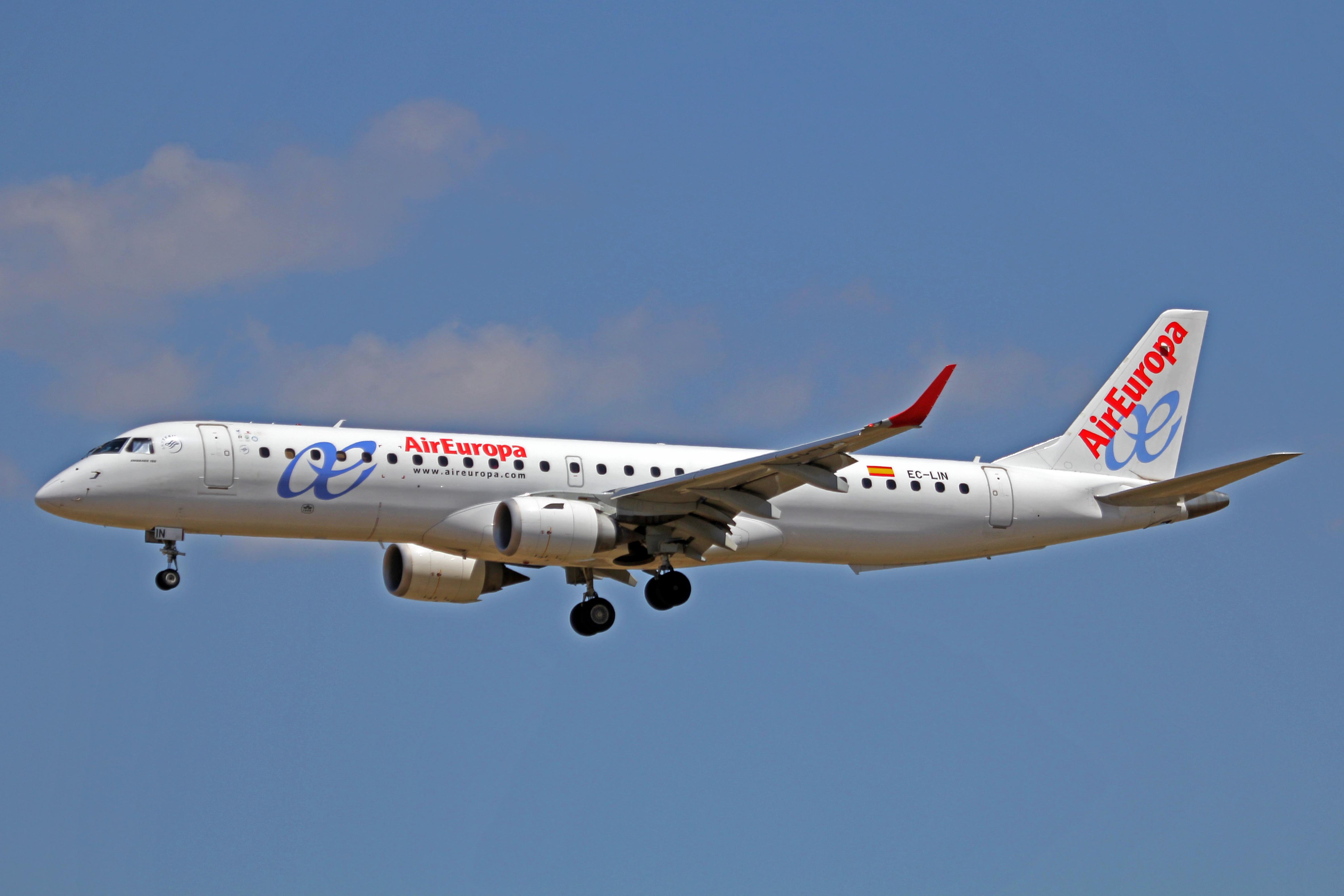 Avió d'Air Europa a l'aeroport de Palma de Mallorca.